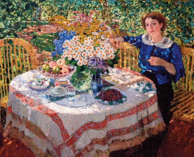 А.М. Герасимов. Портрет Н.Гиляровской. 1912 г. Музей-усадьба А.М.Герасимова (Мичуринск).